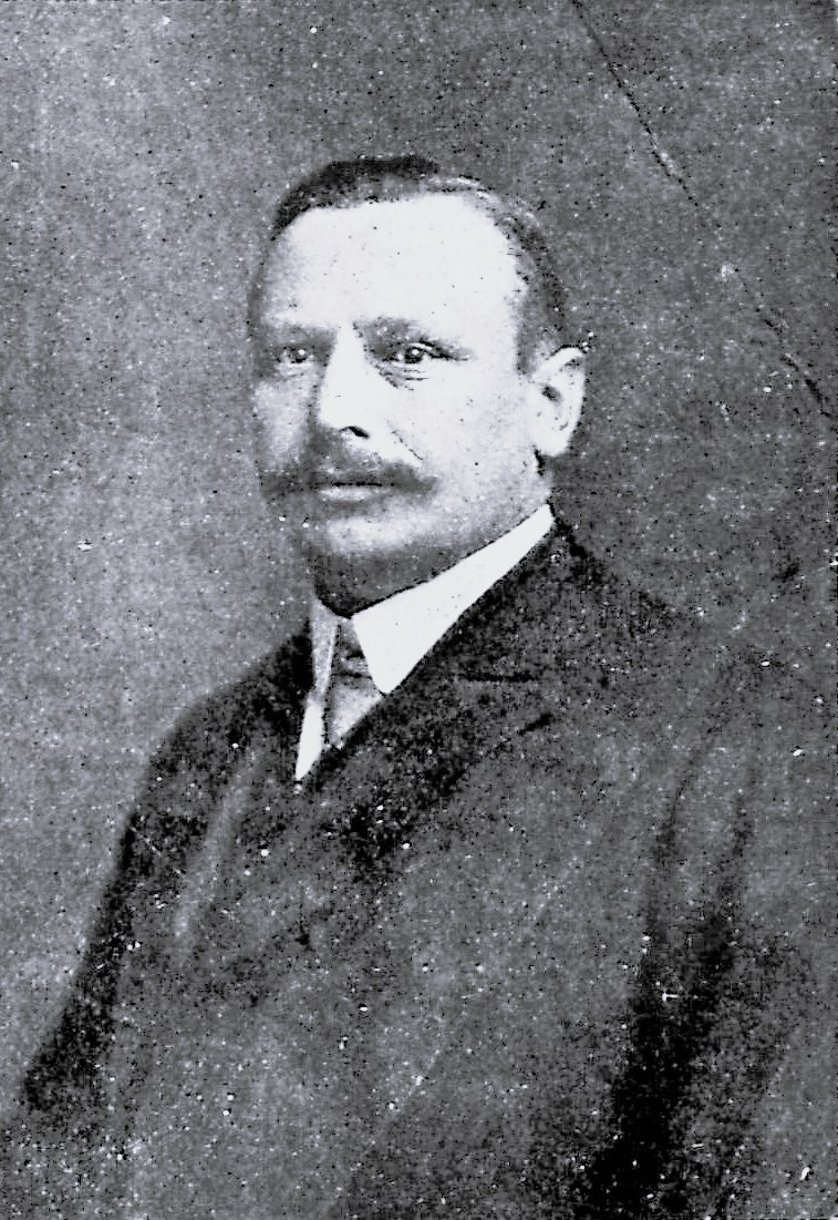 Ernst Boie, neuer Präses der Handelskammer Lübeck